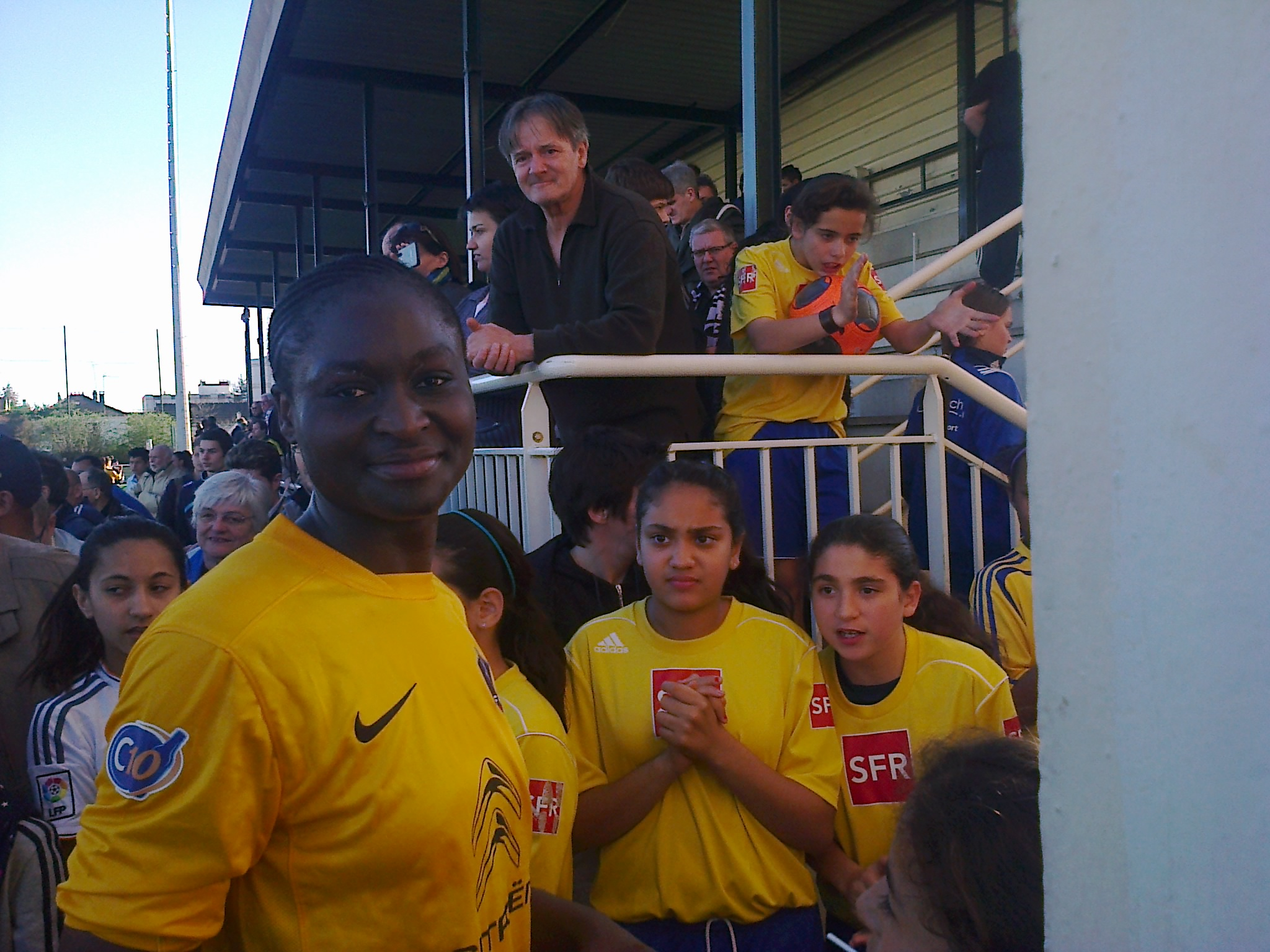 Marlyse Ngo Ndoumbouk après le match VGA Saint-Maur - FCF Juvisy en 1/8 de finale de Coupe de France 2014